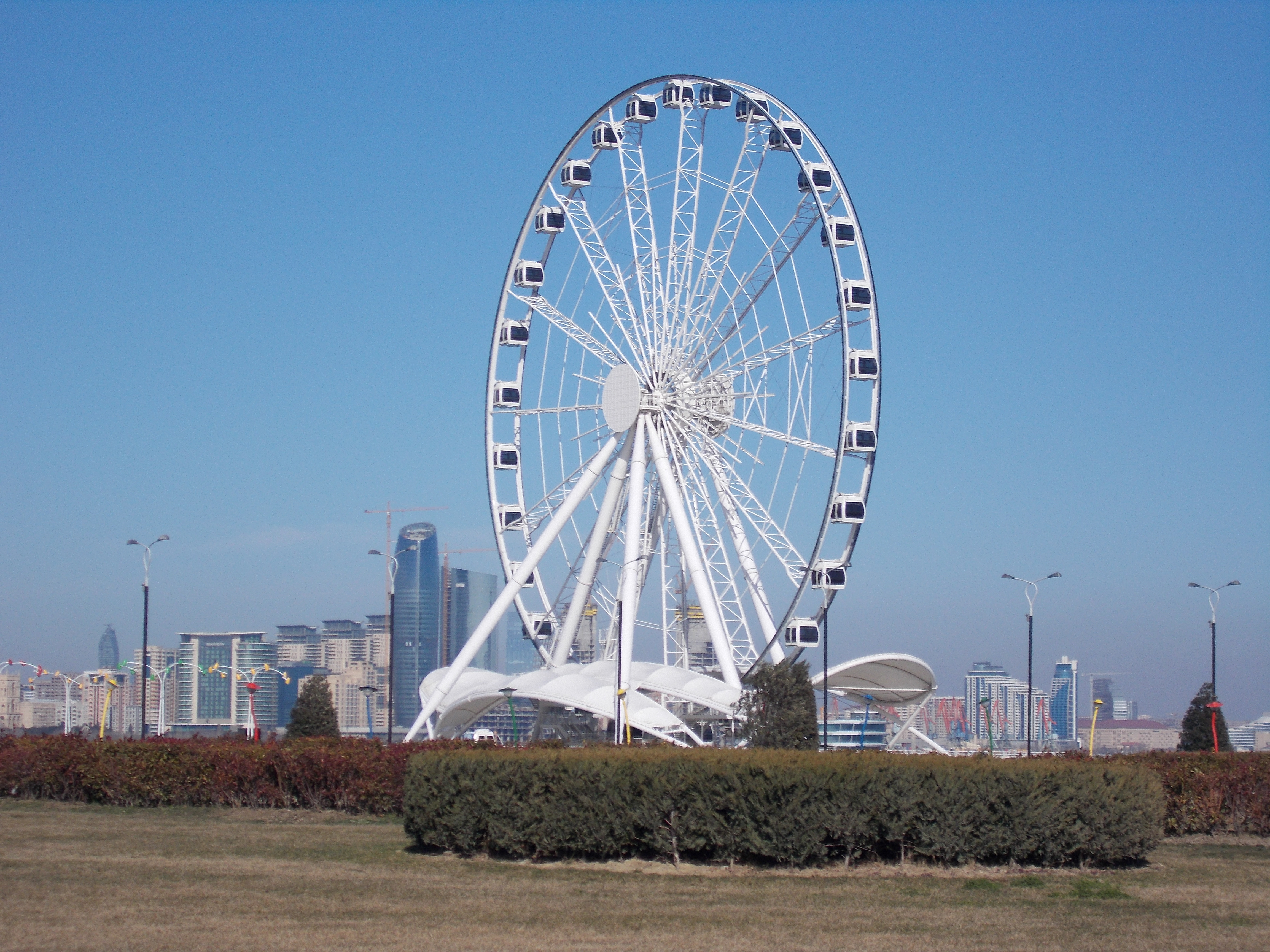 Dənizkənarı bulvar.Yeni bulvarda yerləşən Şeytan Çarxı adlı karusel.